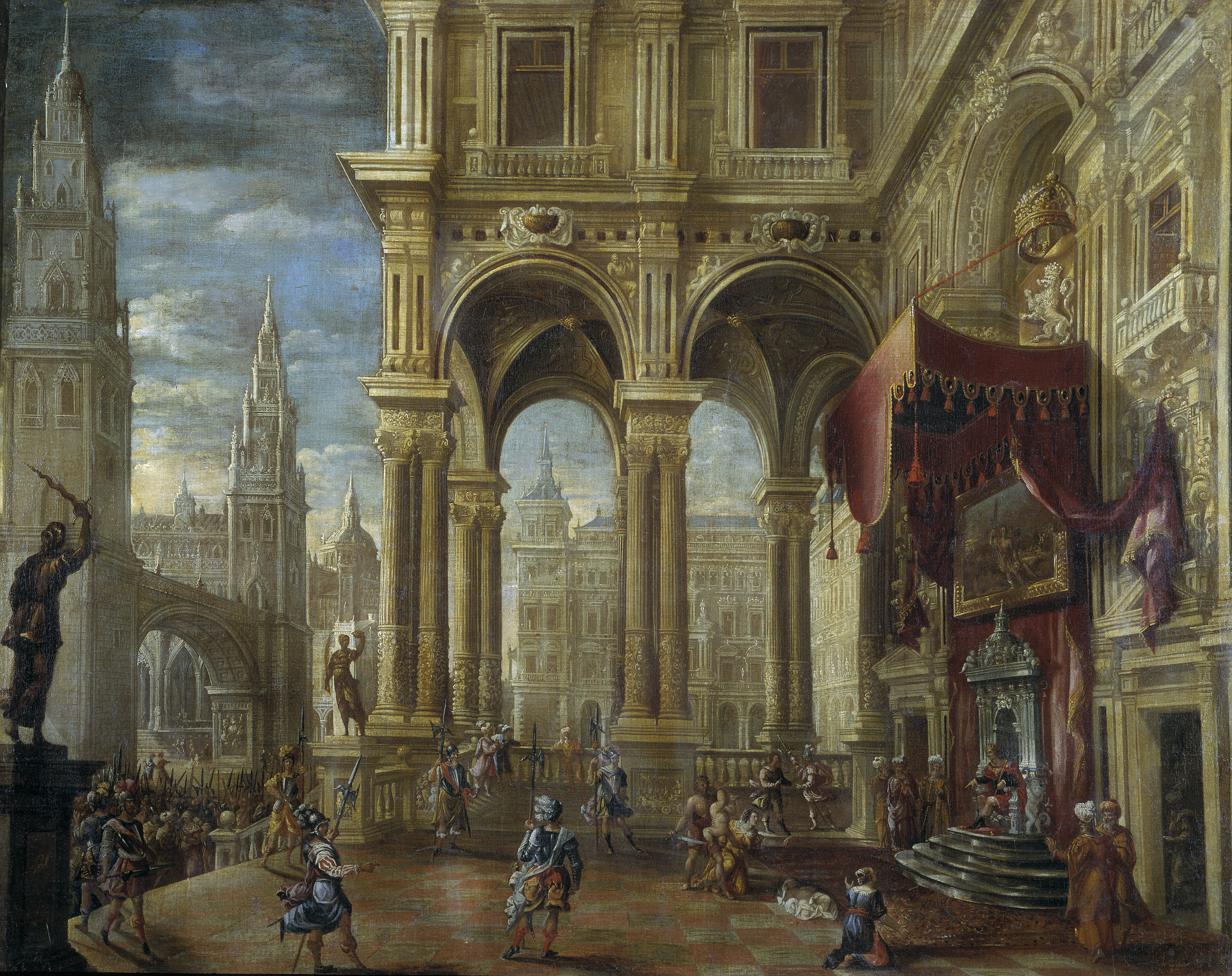 La obra representa el Juicio de Salomón, famoso por el recurso que utilizó Salomón, rey de Israel, para averiguar la verdad en un caso judicial que se le presentaba: la disputa entre dos mujeres, el hijo de una de las cuales había muerto; ambas decían ser la madre del niño vivo.